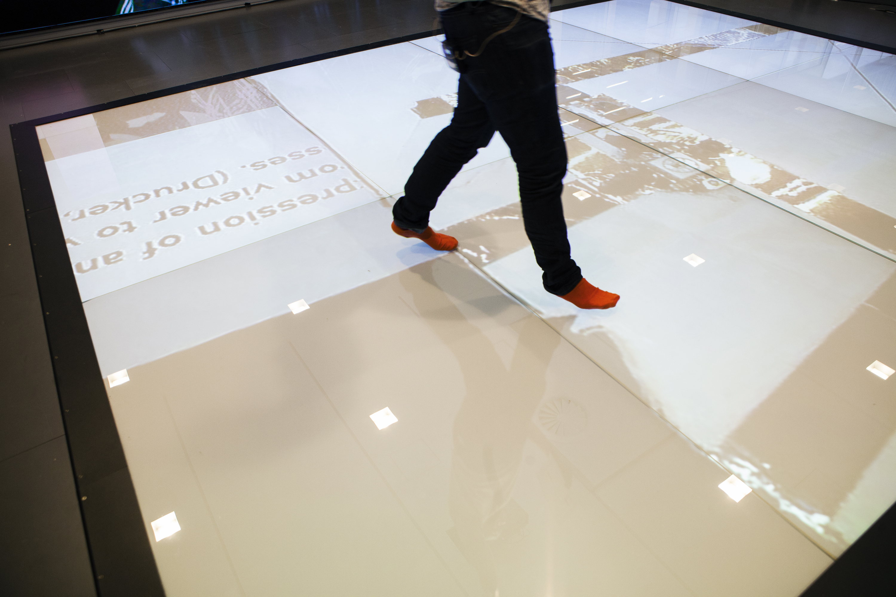 Fötter styr golvskärmen i Humlab-X